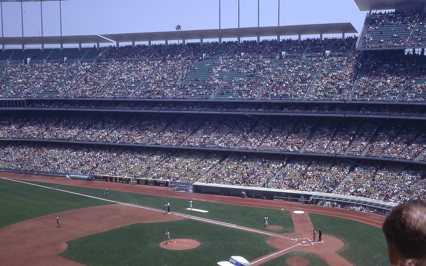 Dodger Stadium Fathers Day 1967 (vs. Reds LA 5, Cinn 2)